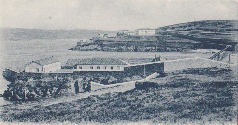 Lazareto de Oza (Santa María de Oza, A Coruña), fotografiado por José Sellier.